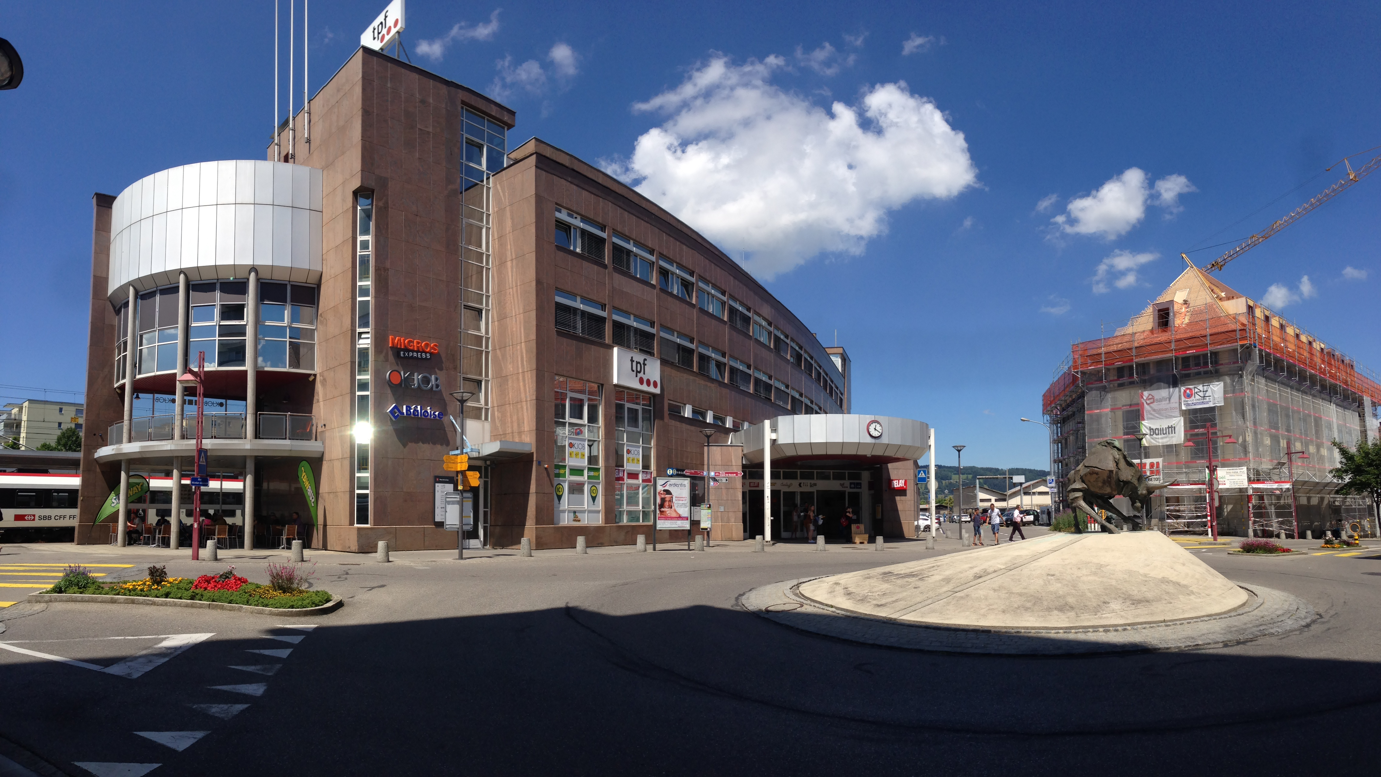 Gare ferroviaire de Bulle (Fribourg), en Suisse, en juillet 2016.